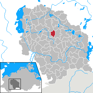 Groß Niendorf in Mecklenburg-Vorpommern - District Parchim